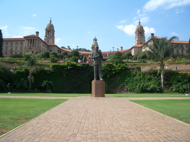 Union Buildings in Pretoria mit Standbild von Premierminister James Barry Munnick Hertzog